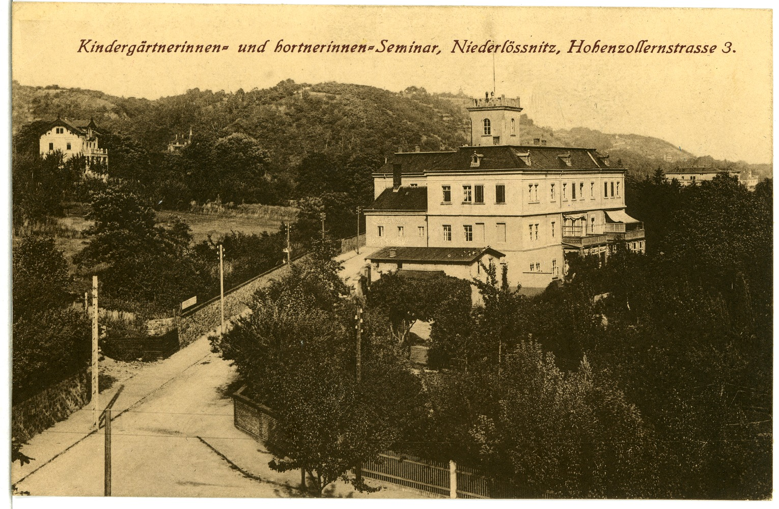 Niederlößnitz; Sanatorium Schloß Niederlößnitz This postcard is from publisher Brück & Sohn in Meißen ( postcard has a unique number 02892 and is available in a higher resolution at the publisher. This images was uploaded in a cooperation project between Wikipedians and the publisher.